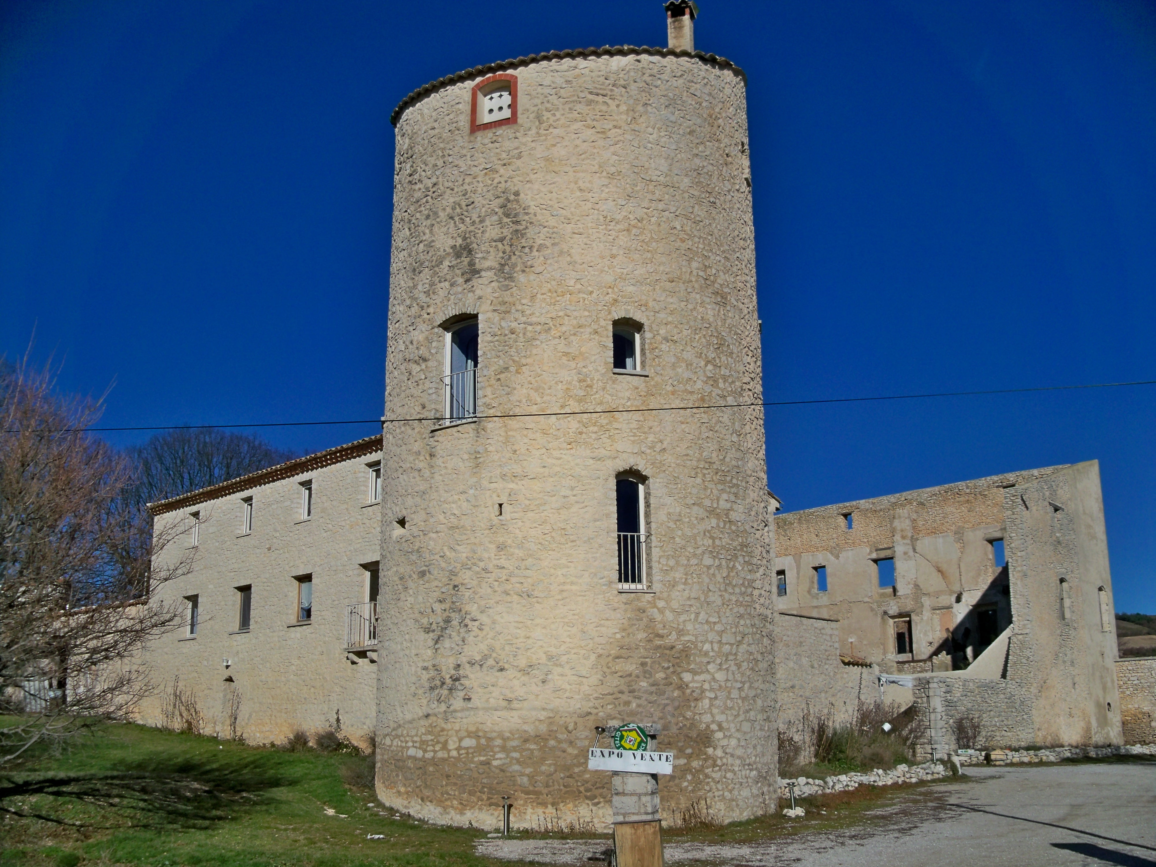 Chateau de la Gabelle (Ferrassières)